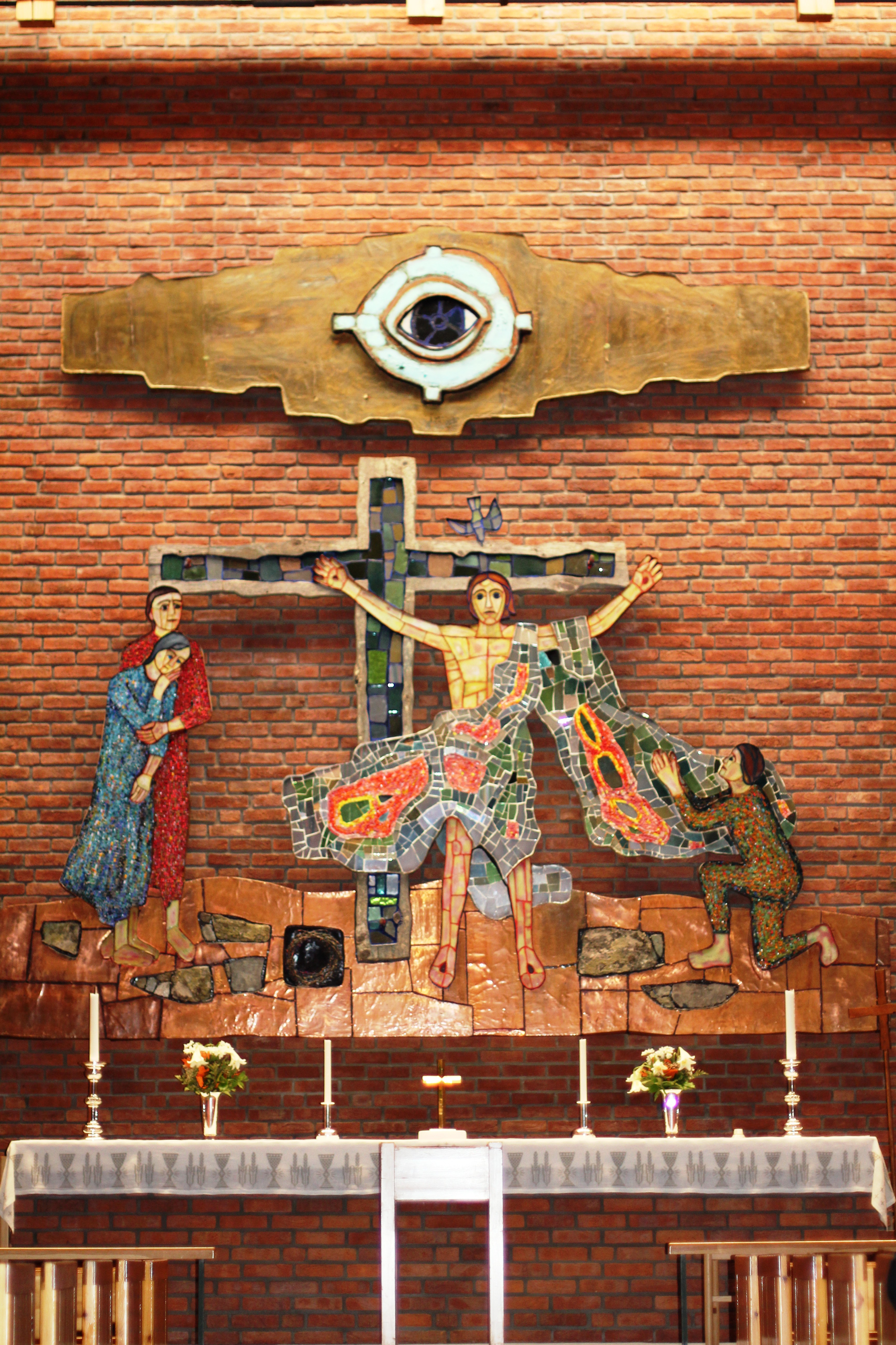 Altertavla i Hunn kirke i Gjøvik.